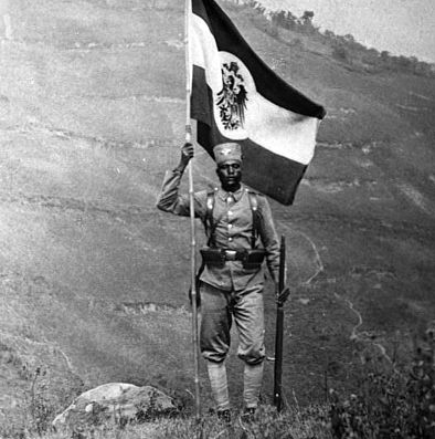 Kiswahili: DOA soldier, before or during WWI